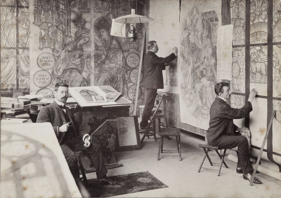 Het atelier van glazenier Otto Mengelberg door J.J.A. van Winsen. Links (zittend) Mengelberg.